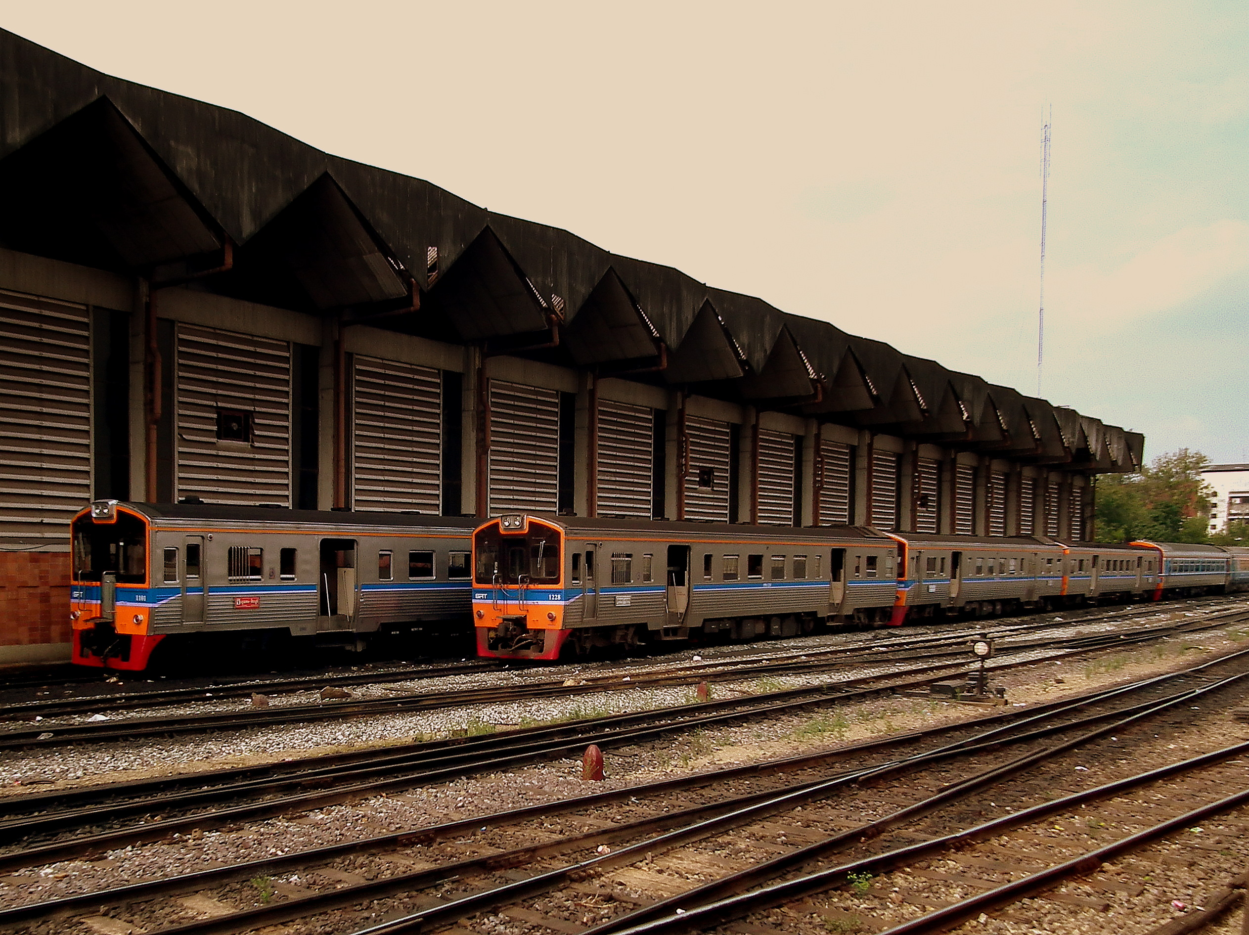 HUALAPHONG STATION BANGKOK THAILAND JAN 2012